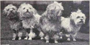 Little Lion Dog from 1915